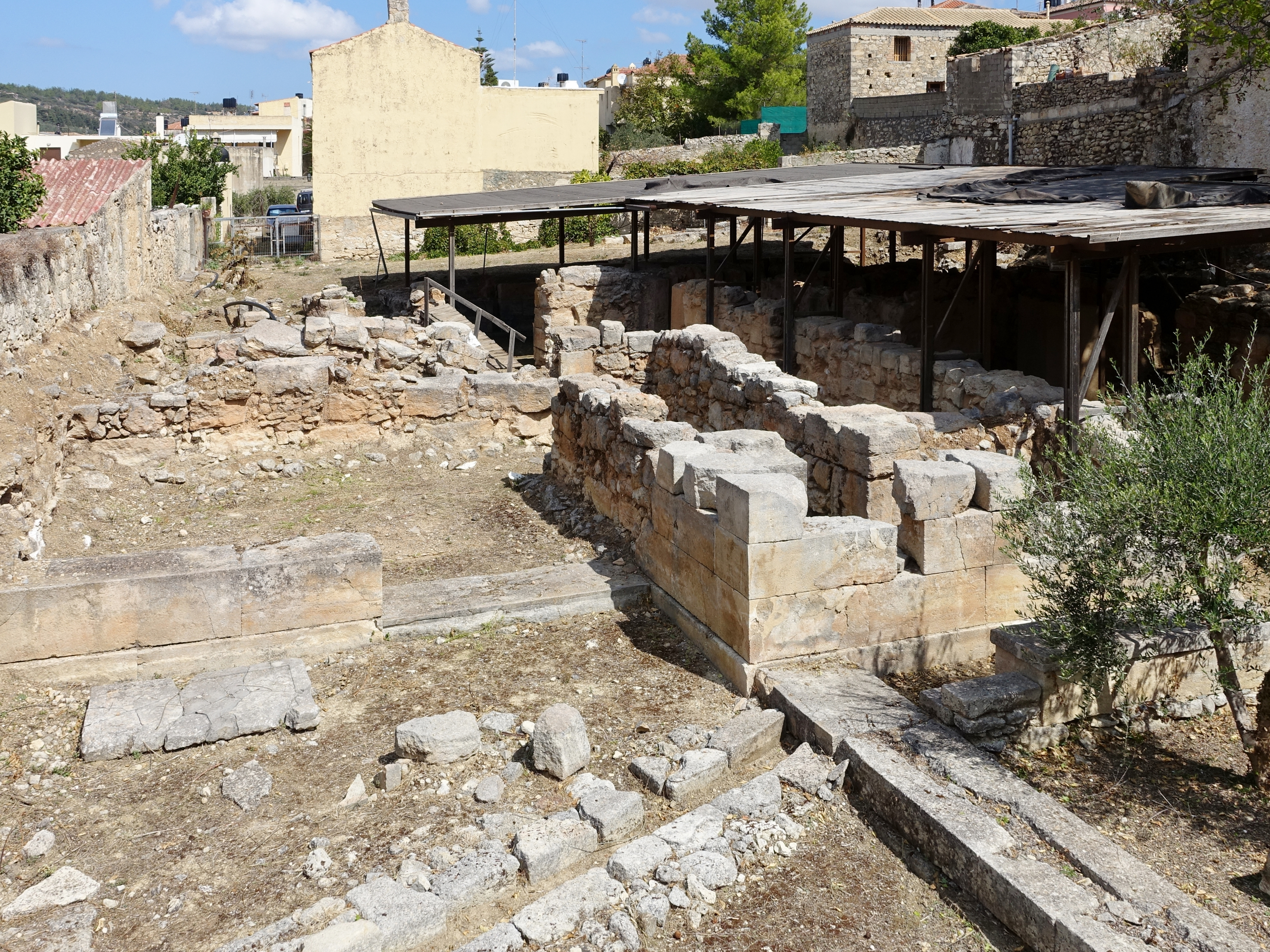 Ausgrabungsstätte des „Palastes“ von Archanes (Αρχάνες), Gemeinde Archanes-Asterousia, Kreta, Griechenland